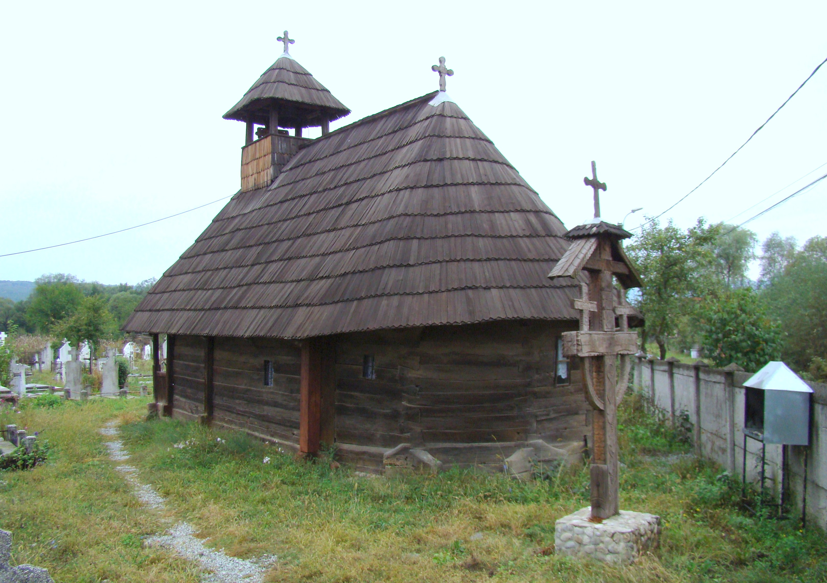 Biserica de lemn „Toți Sfinții” din Tălpășești, Gorj